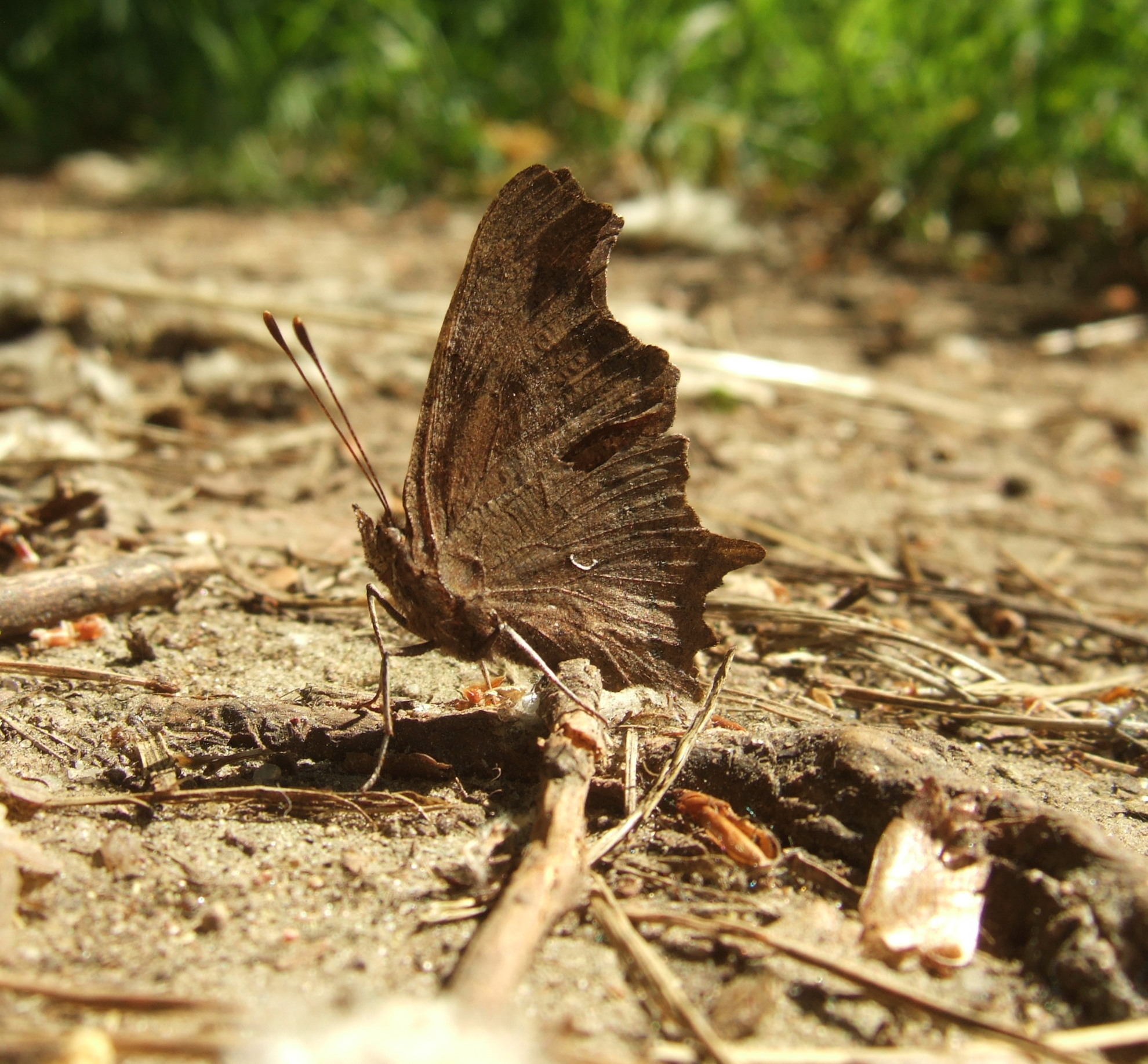 Karpytūnė (lot. Polygonia c-album) Vilniuje